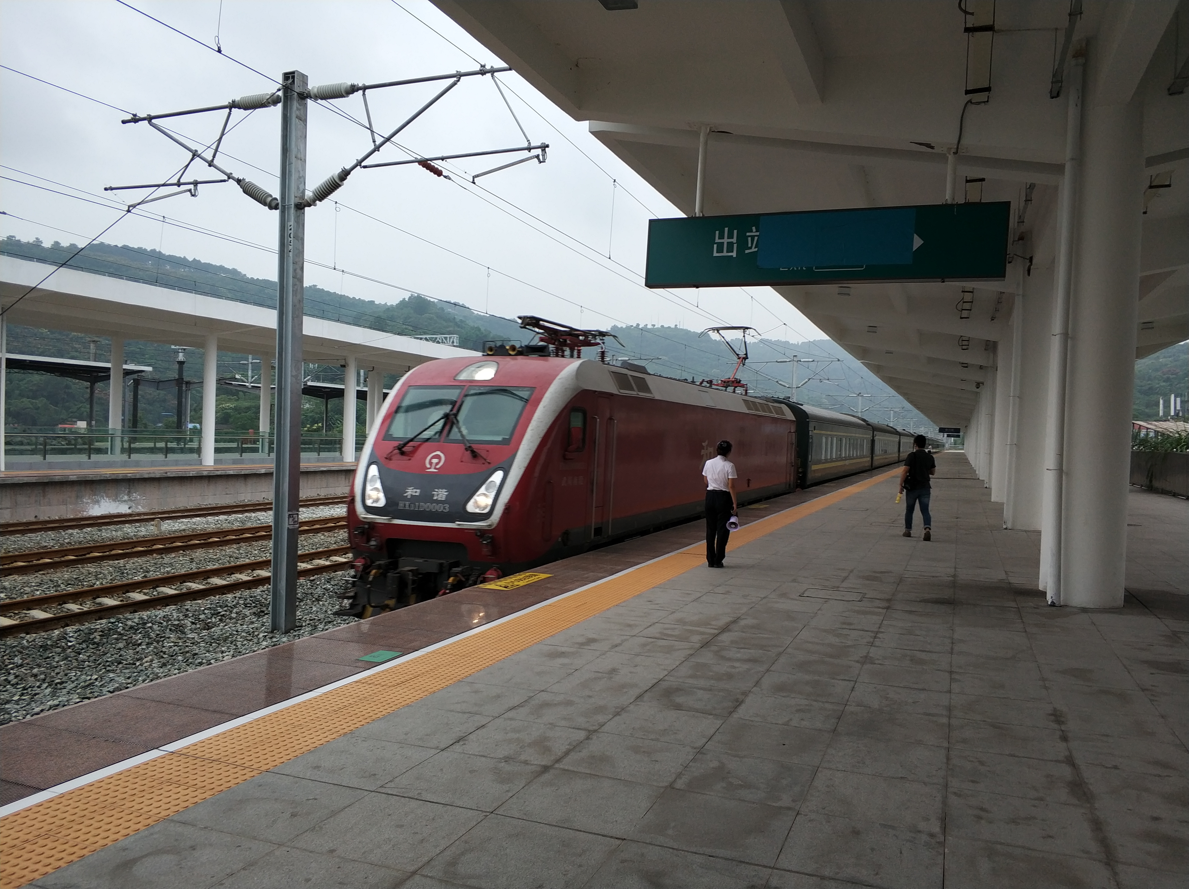 合川站站台